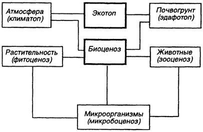 Биогеоценоз